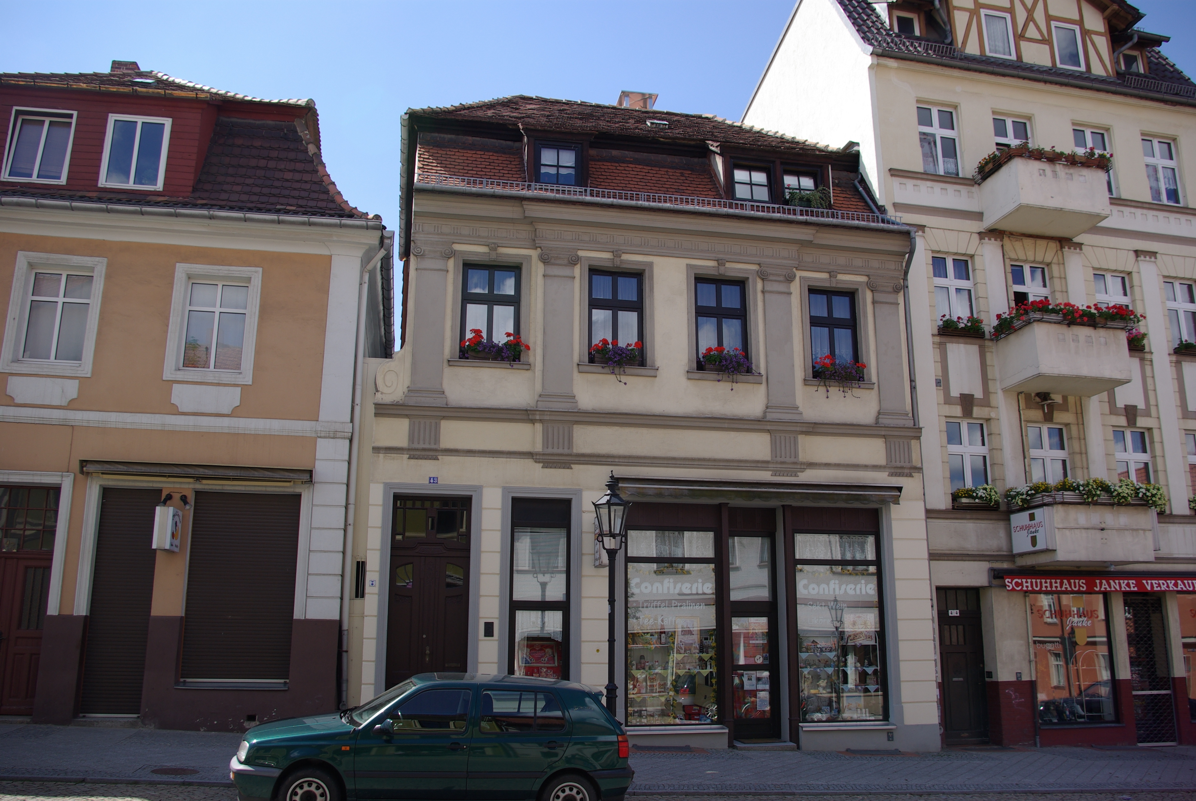 Bad Freienwalde / Oder in Brandenburg. Das Haus in der Königstraße 43 steht unter Denkmalschutz.